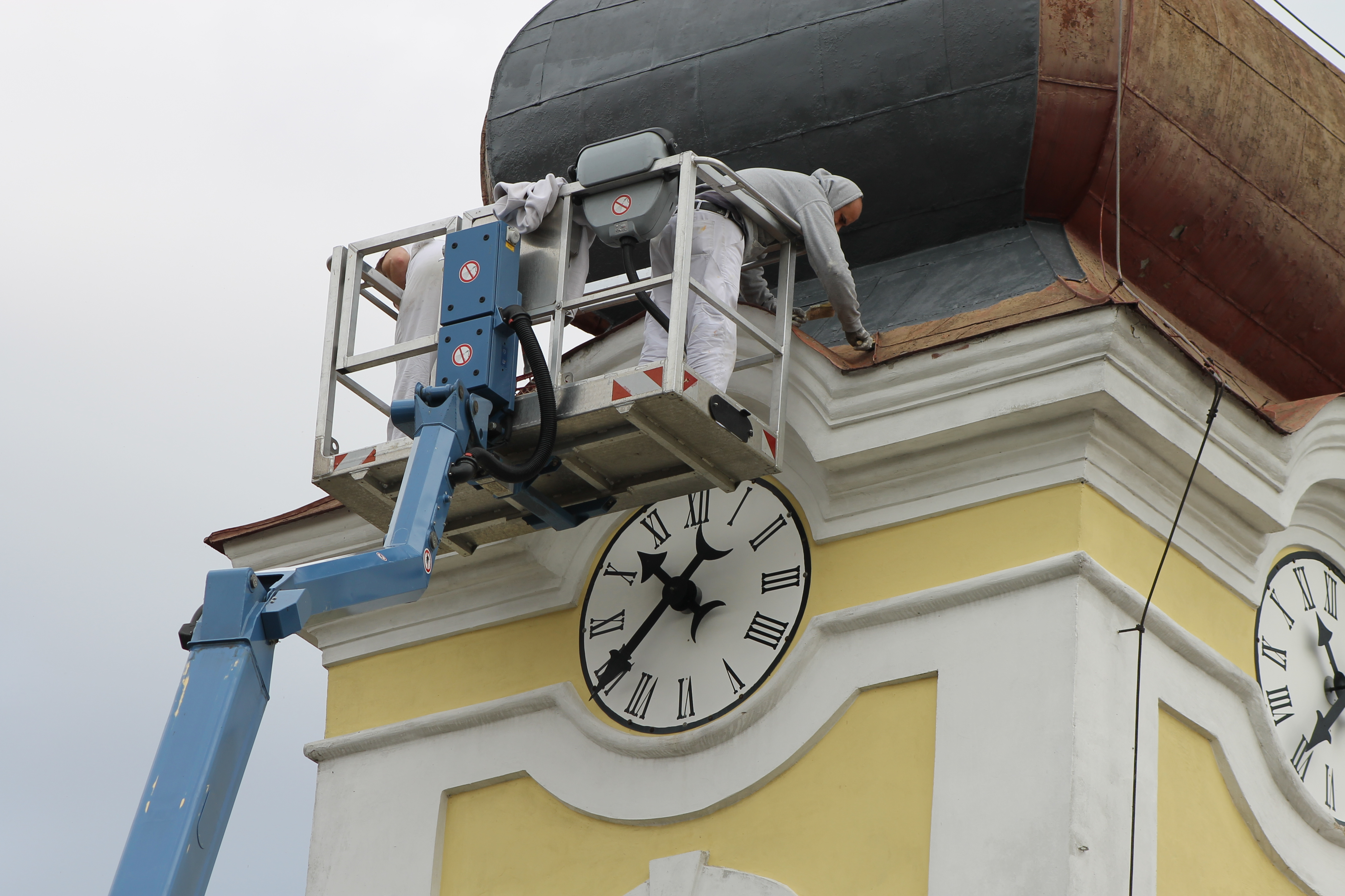 A pilisszentiváni templom toronysisakjának felújítása